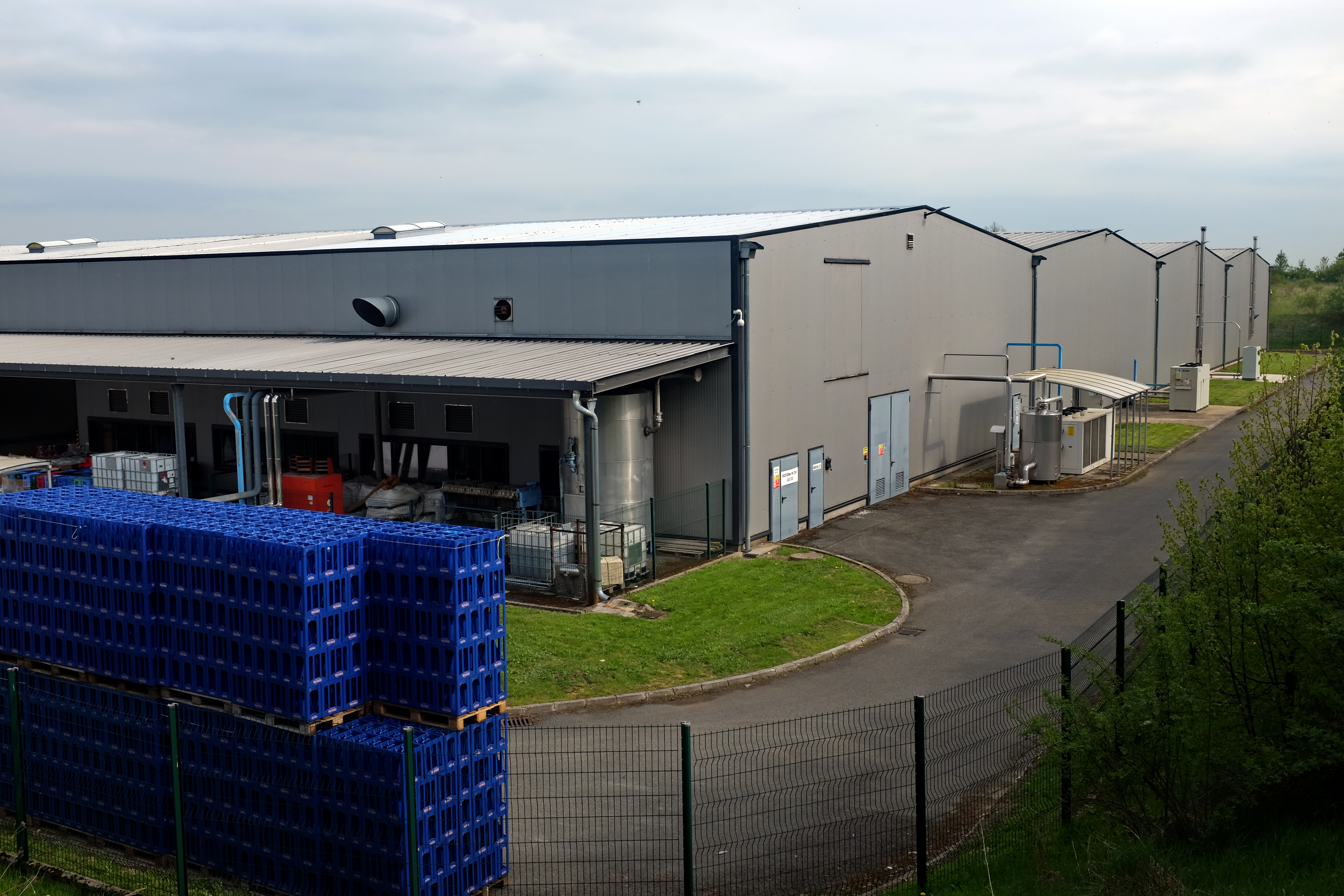 Mnichov, stáčírna minerálky Magnesia, okre Cheb